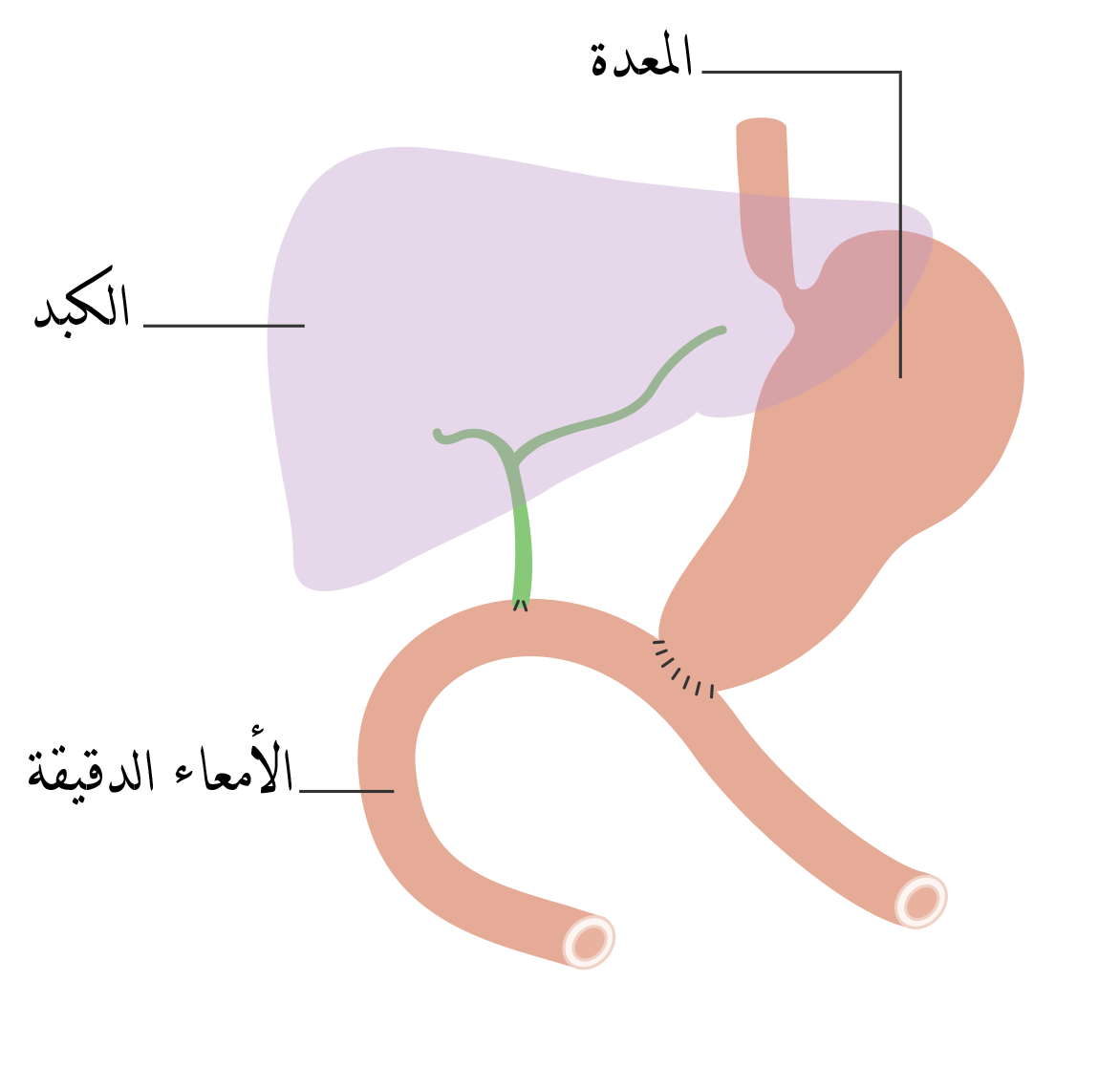 صورة توضيحية